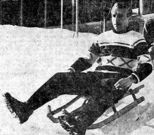 Borivoje „Bora“ Kostić (1930-2011)